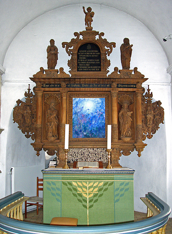 Altertavlen Skanderup Kirke , Skanderborg, Hjelmslev Herred, .Århus Amt (tidligere Skanderborg Amt)